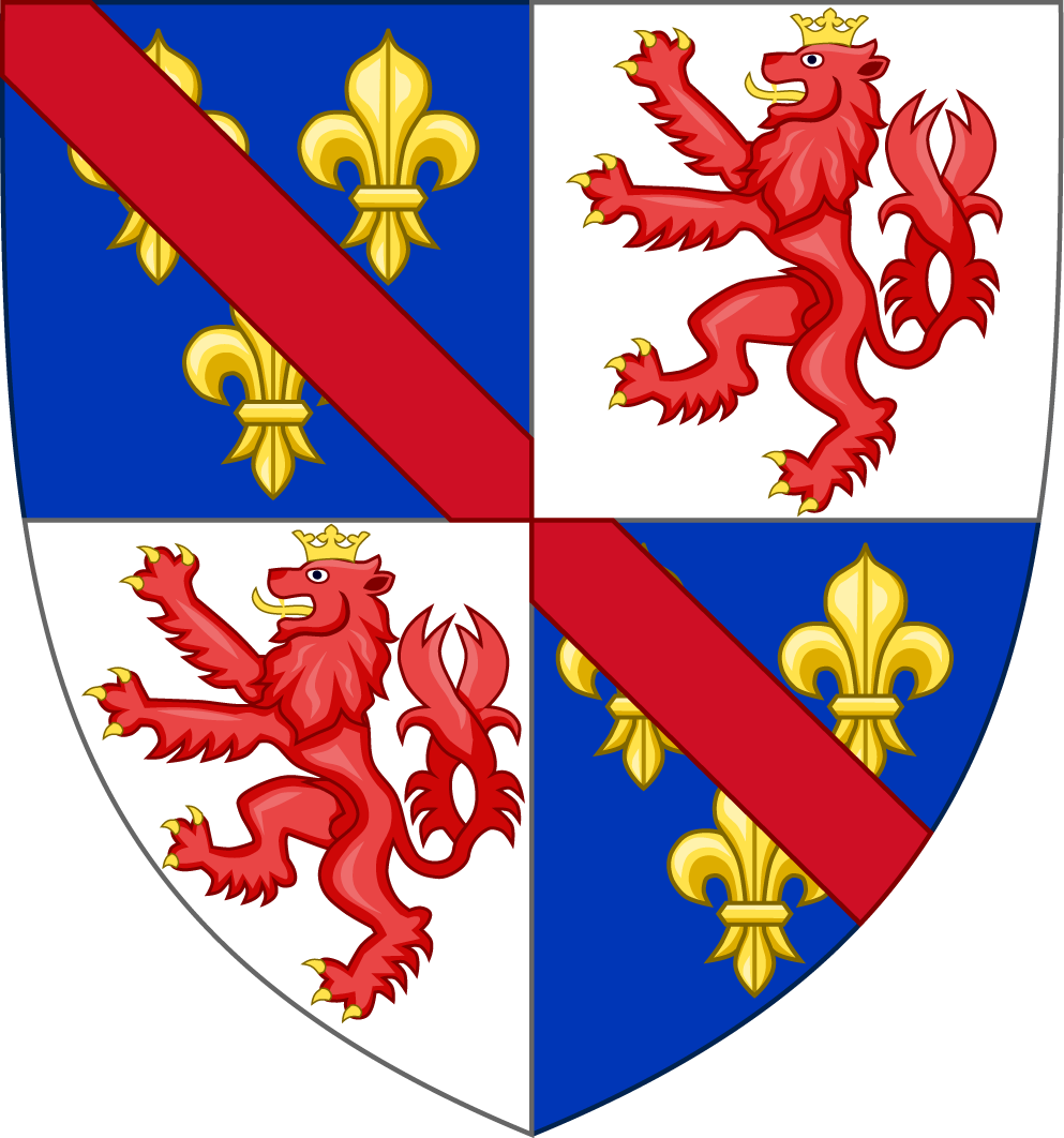 Armes de François de Bourbon, comte de Saint-Pol